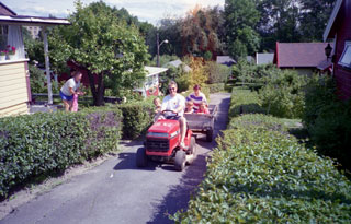 Allotment garden, Oslo.